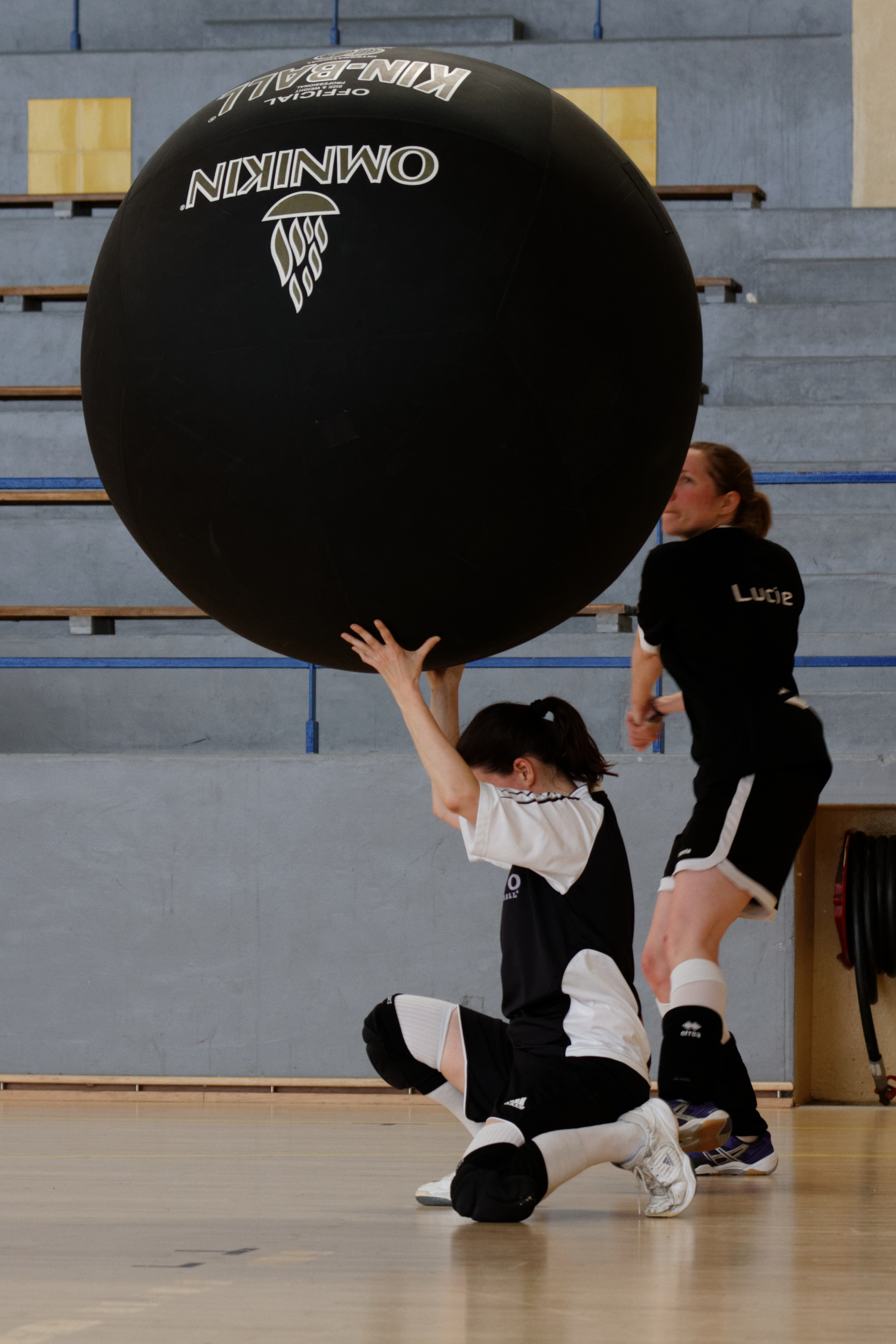 20e journée du championnat de France 2013-2014 de Kin-Ball, 8 juin 2014, Gymnase George Carpentier, Paris.